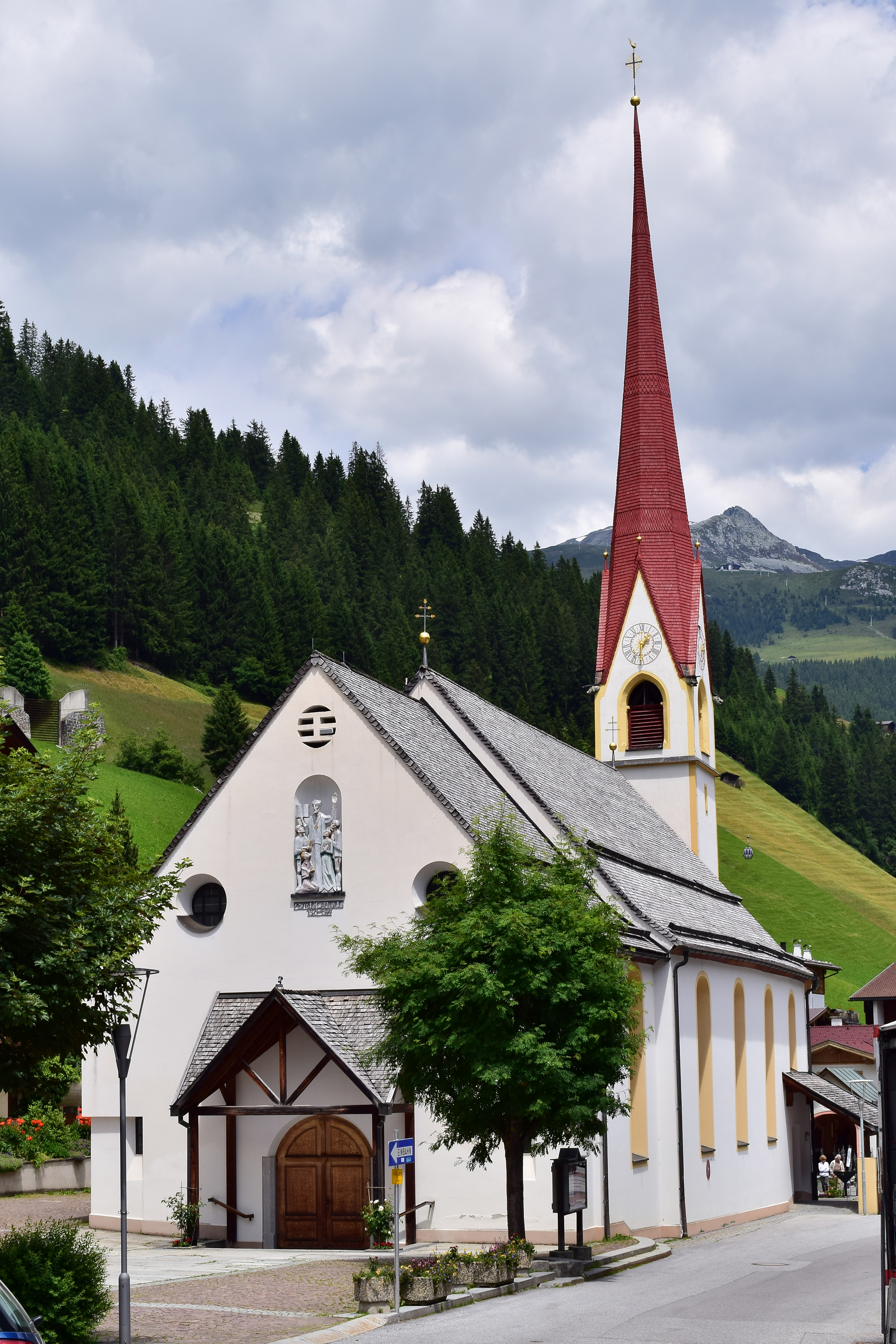 Kath. Pfarrkirche hl. Thomas mit Aufbahrungshalle